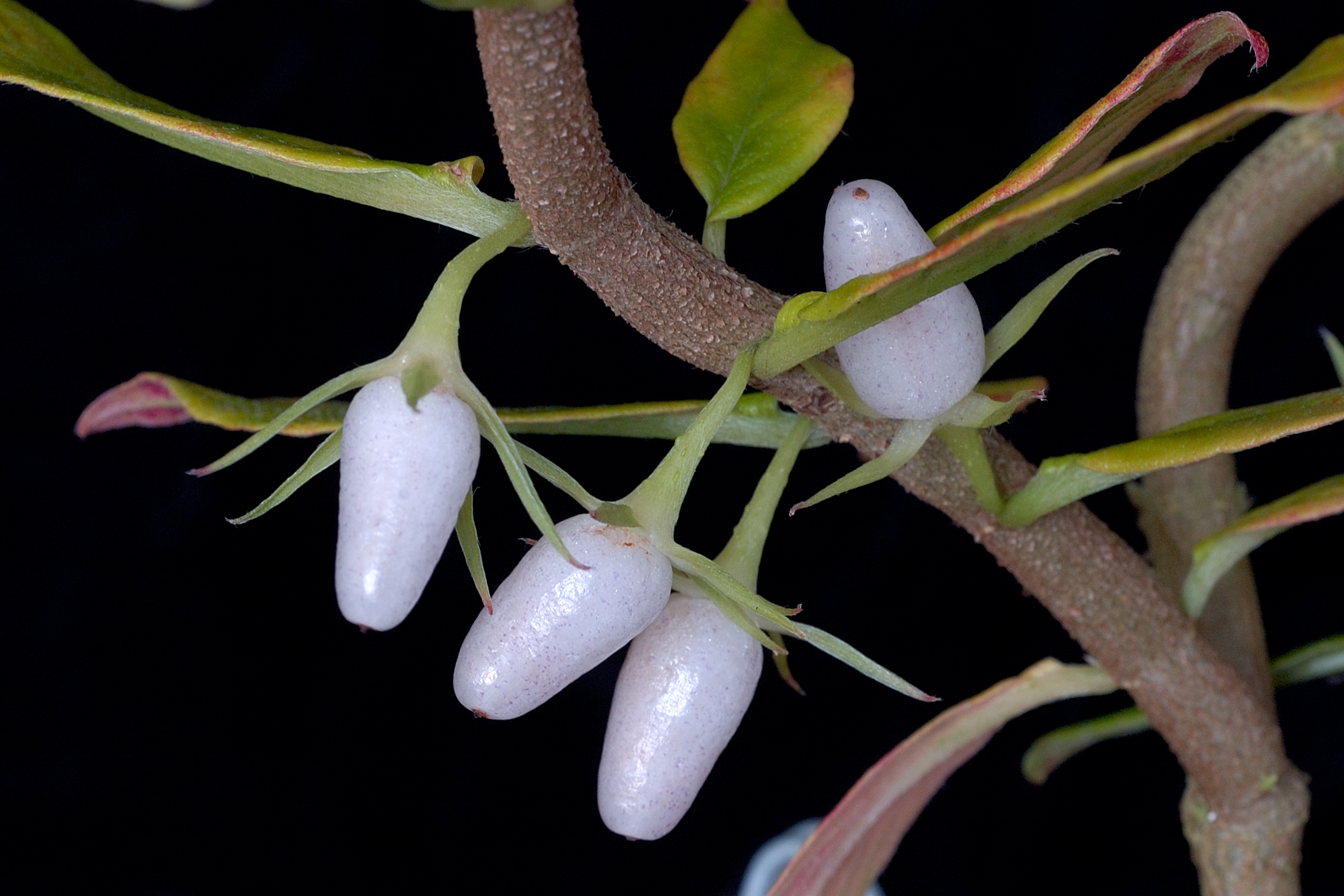 Columnea orientandina, fruit, species from Ecuador